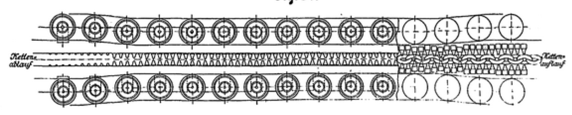 Verlauf der Kette (Kettengreifrad nach Bellingrath)